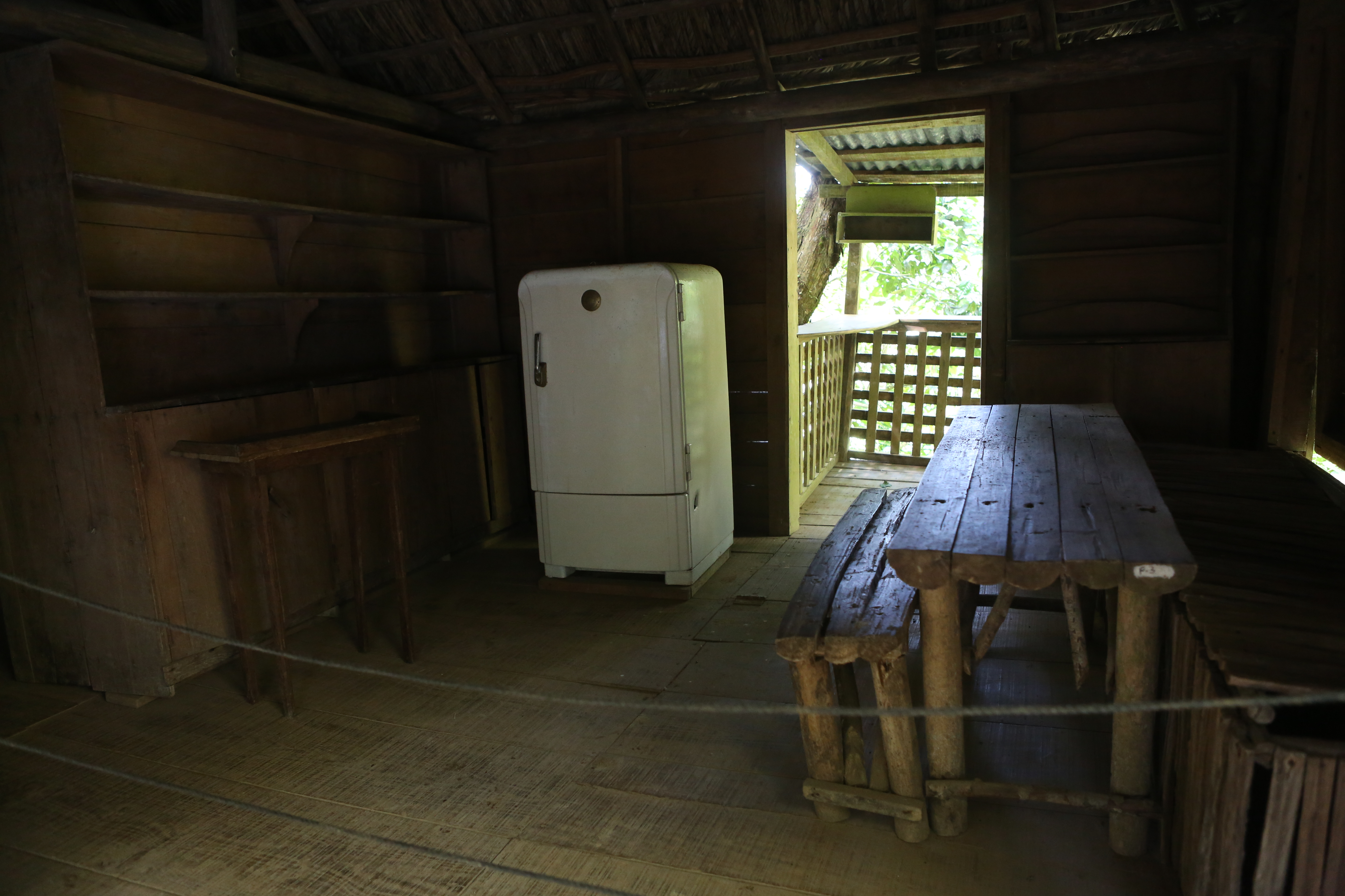 Blick in den Wohnraum mit Kühlschrank in der Hütte von Fidel Castro